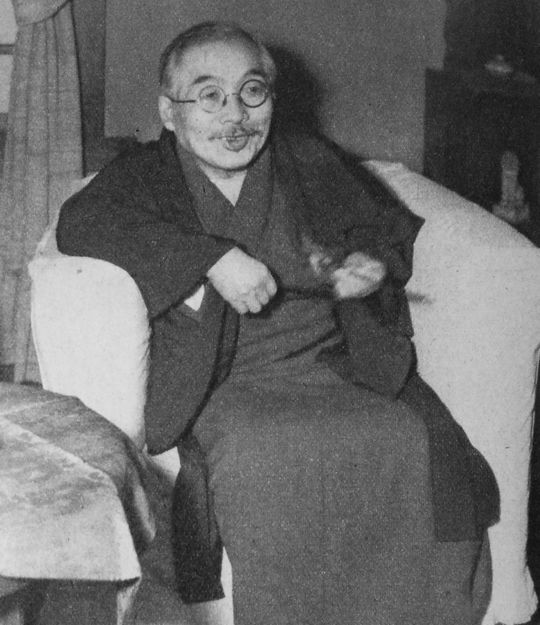 佐々木惣一